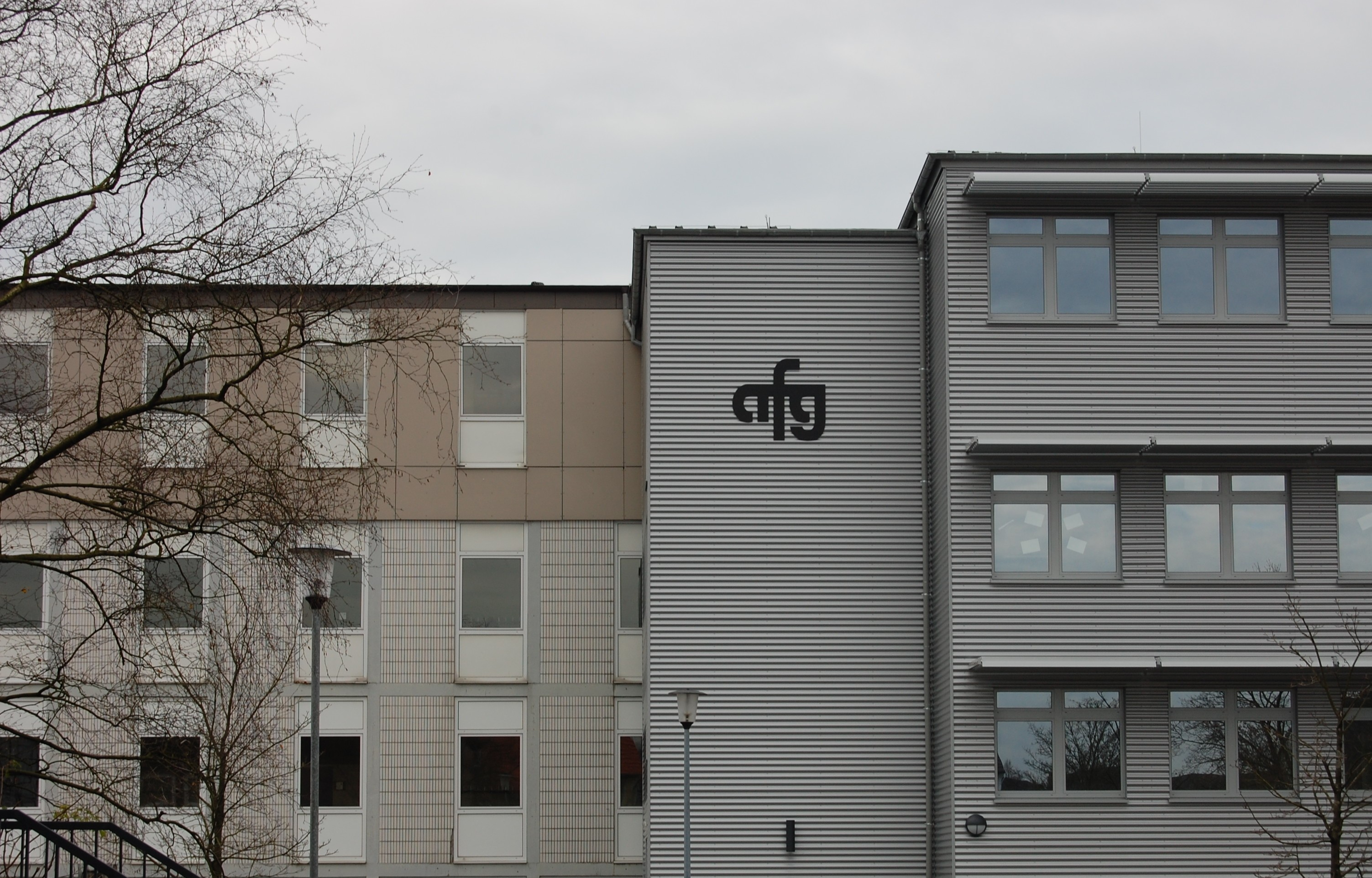 Die Vorderseite des Anne-Frank-Gymnasiums Halver